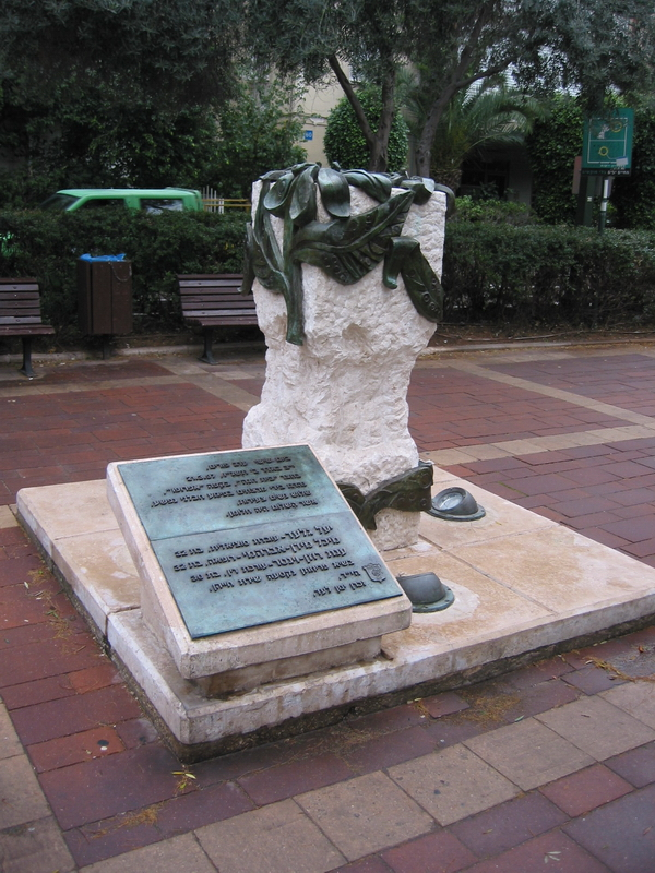 אנדרטה לזכר הרוגי הפיגוע בקפה אפרופו